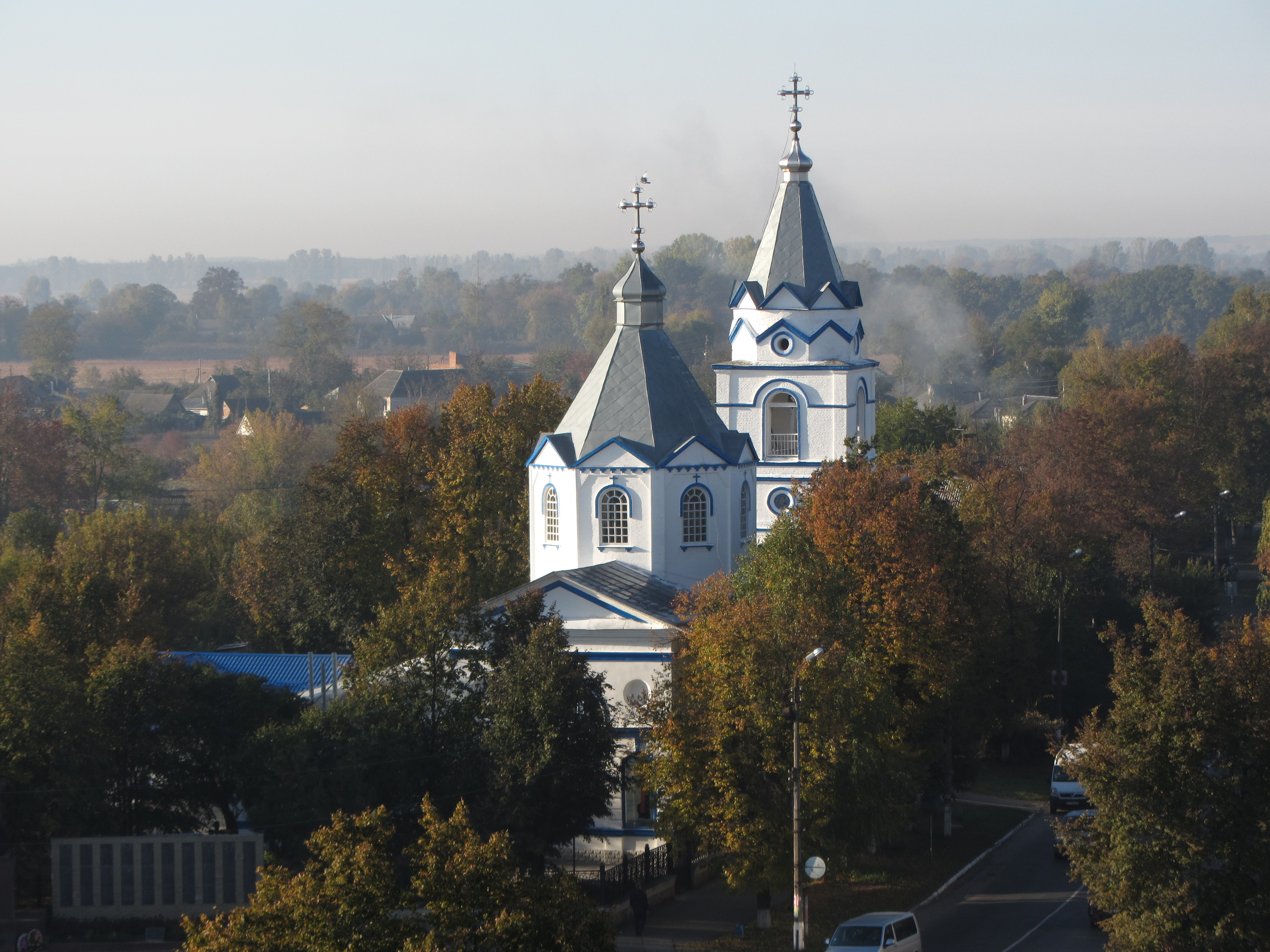 м. Лохвиця. Благовіщенська церква.